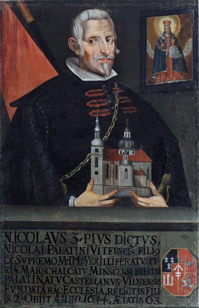 Беларуская (тарашкевіца): Партрэт Мікалая Сапегі «Пабожнага» (Mikałaj Sapieha «Pabožny») гербу «Ліс» (1581—1644), ваяводы берасьцейскага і менскага